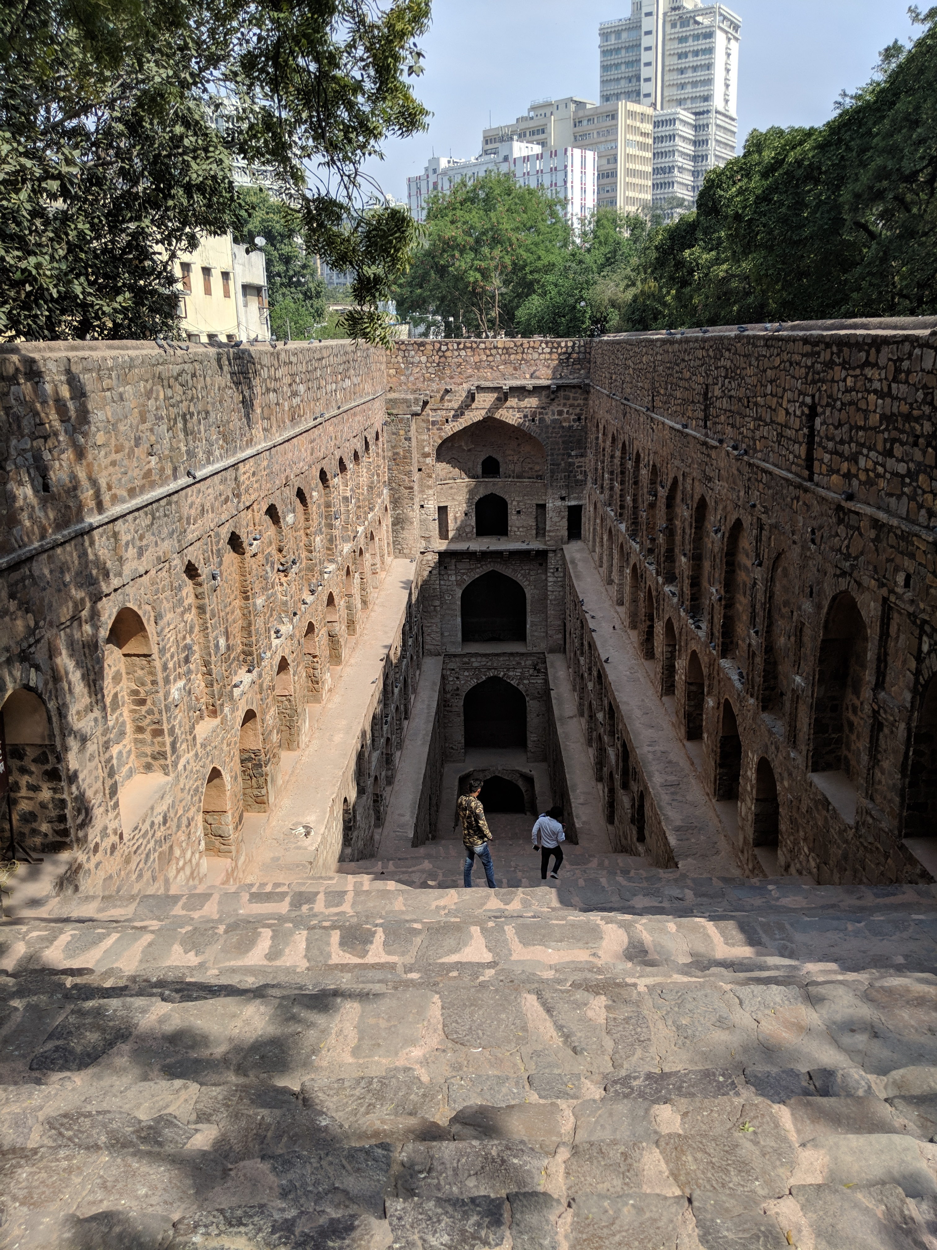 کوردی: ئەگراسین کی باولی یەکێکە لەشوێنەکانی زەخیرەکردنی ئاو لەدیلهی، هیندستان. لەئێستادا بۆتە شوێنێکی گەشتیاری لەوەی ئەمبارکردنی ئاو